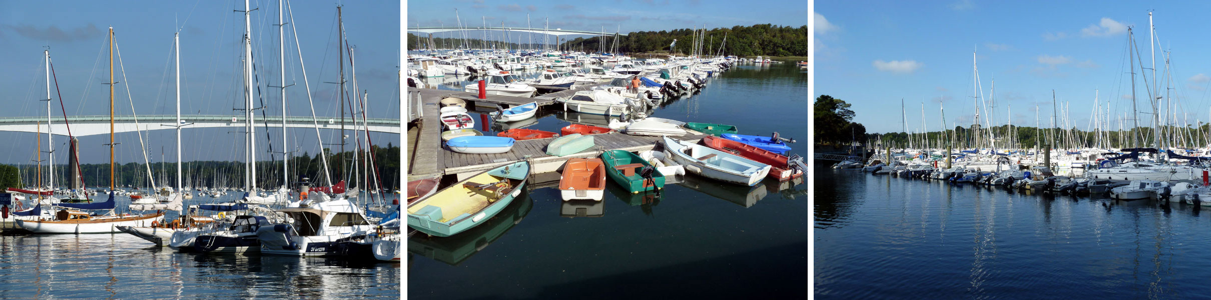 3 vues du port de plaisance de Bénodet.